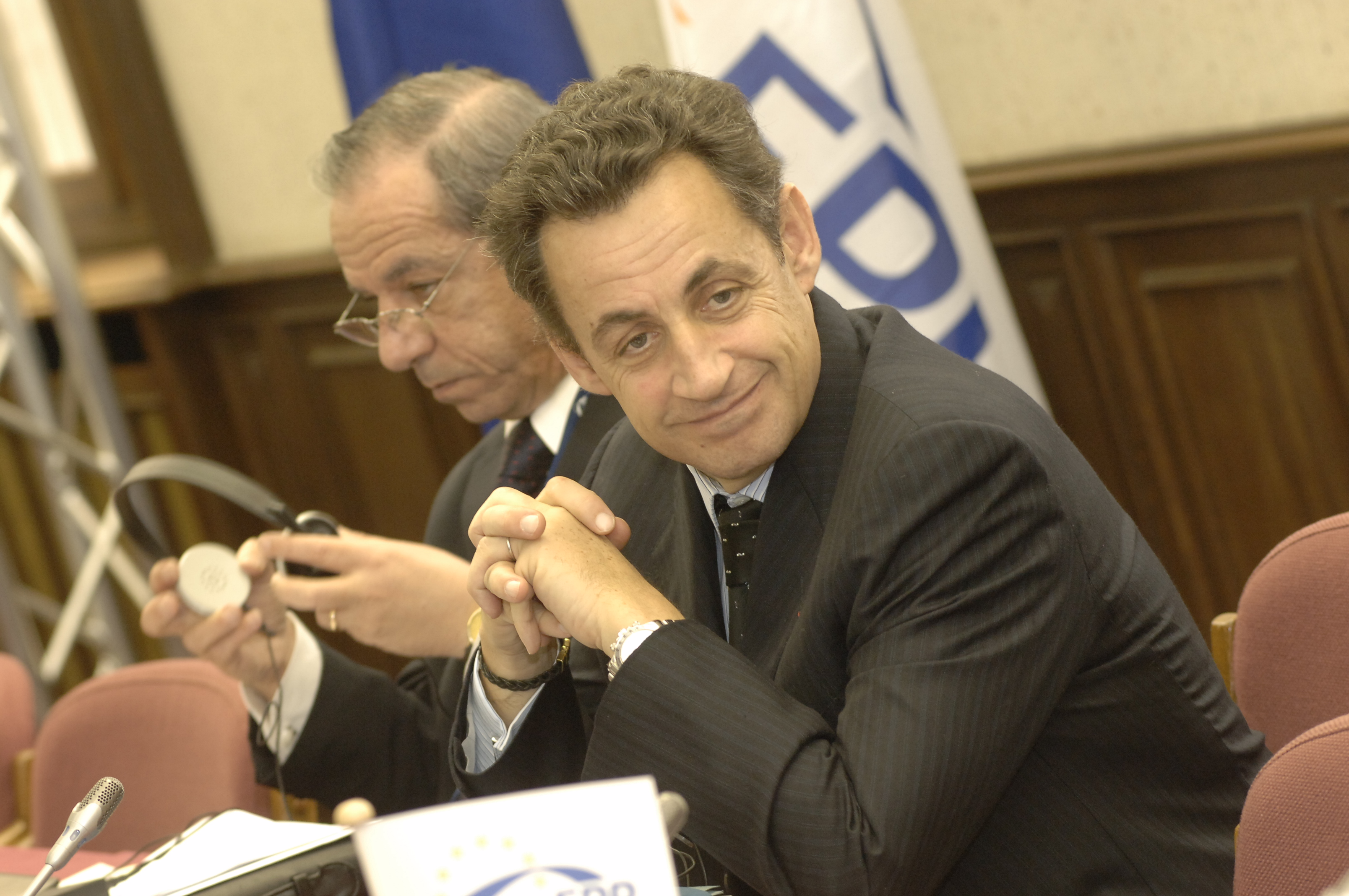 EPP Summit 14 December 2006